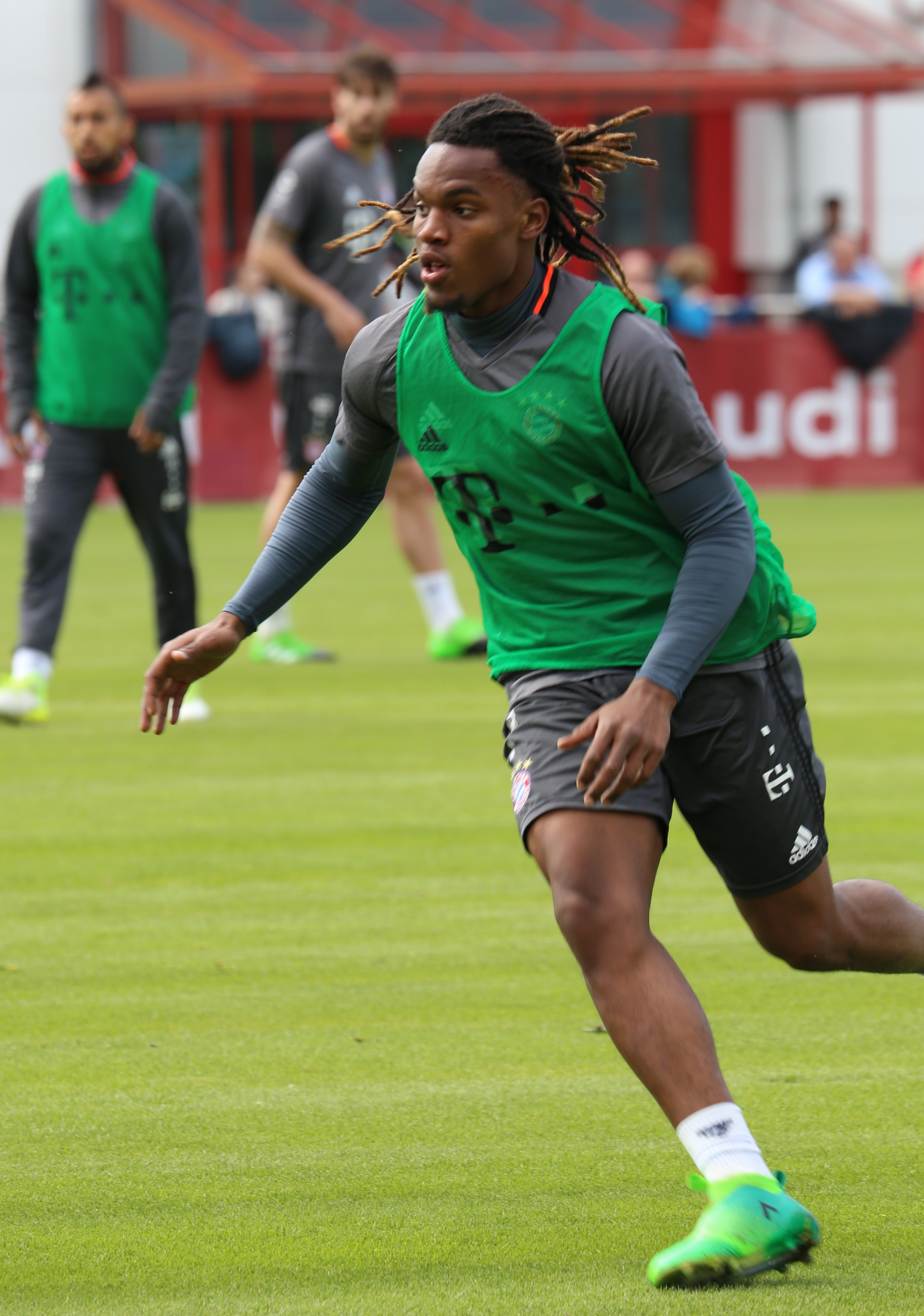 Renato Sanches, am 3. Mai 2017 beim Training auf dem Gelände des FC Bayern München